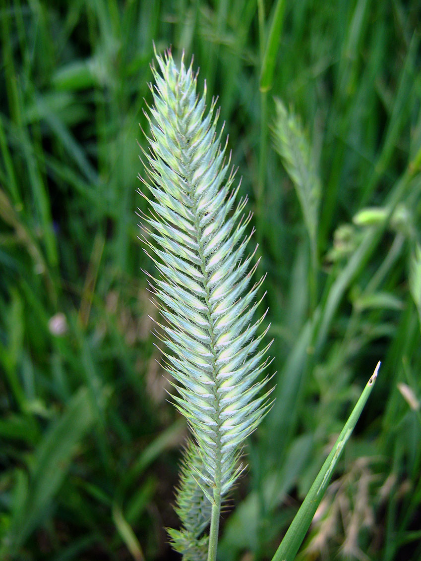 Srpski (latinica): Češljasta pirevina (Agropyron cristatum), česta trava u blizini lesnih pobrđa i njihovih odseka. Tipičan je predstavnik stepske flore, dobro trpi suve, gotovo polupustinjske uslove. Nekada rasprostranjena trava, danas nestaje zajedno sa svojim staništima, prirodnim pustarama. U mnogim delovima Vojvodine gde je izvorno bila karakterna vrsta, može se videti još samo uz železničke pruge, krstove krajputaše ili pod starim humkama (kurganima) kao u ovom slučaju, kod Horgoša.